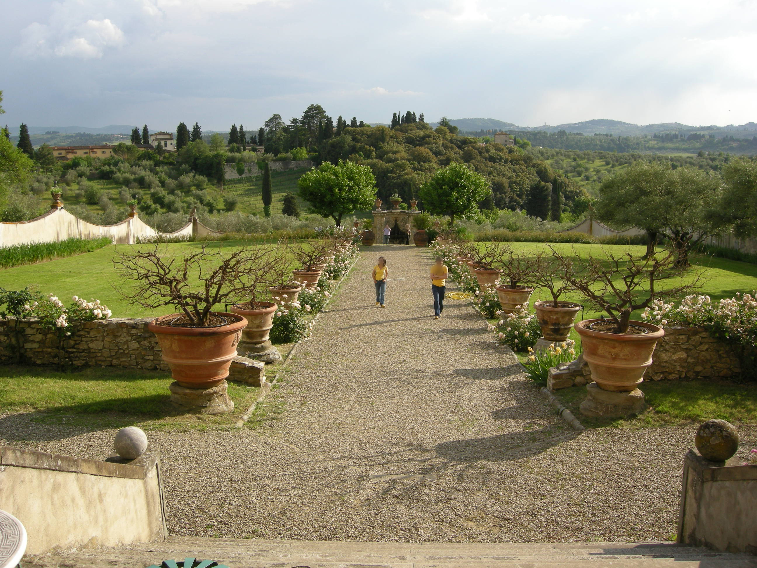 Villa di lilliano 06 giardino